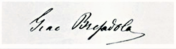 Giacomo Bresadola: Autograph